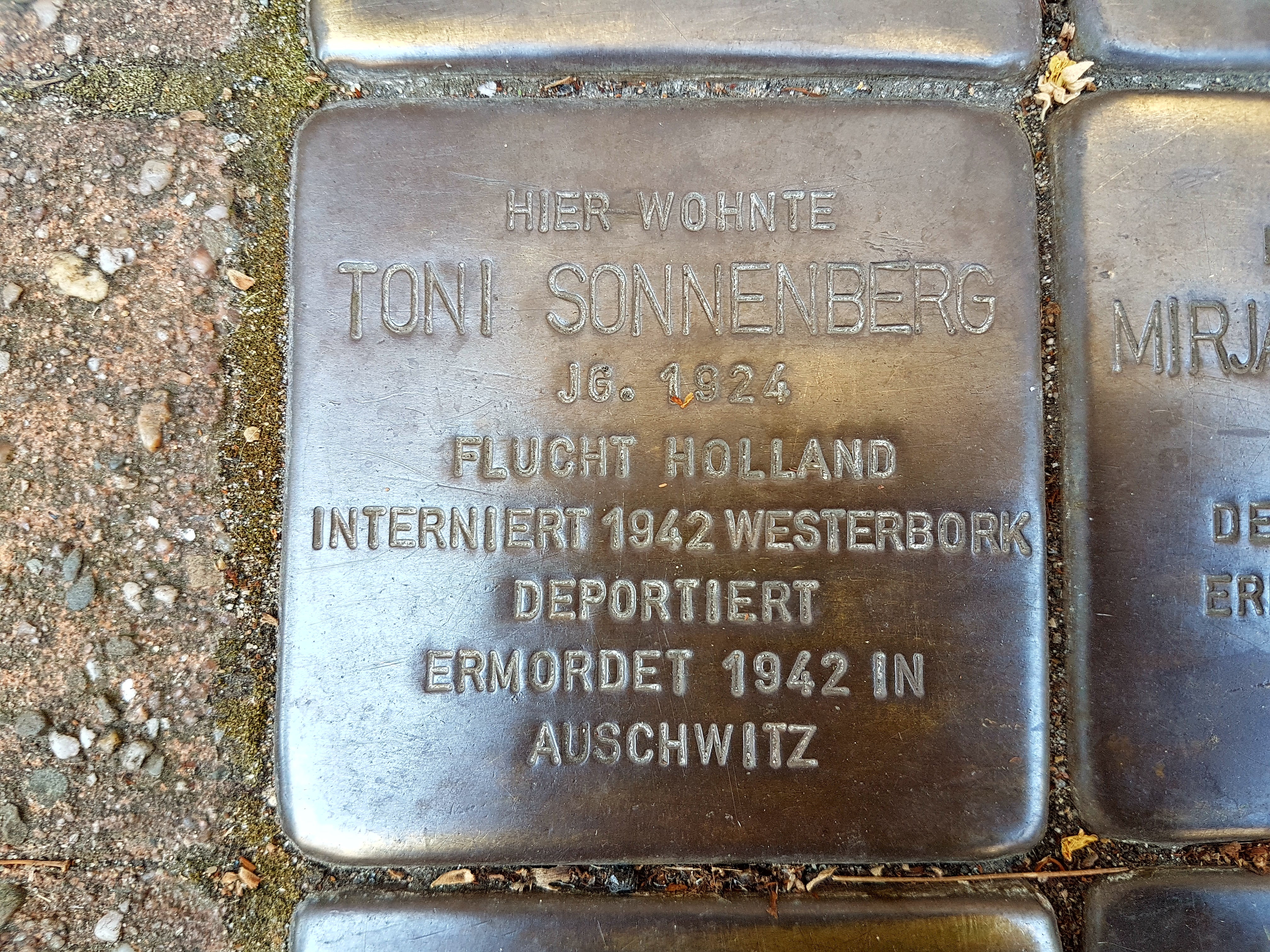 Toni Sonnenberg Stolpersteine Duisburg